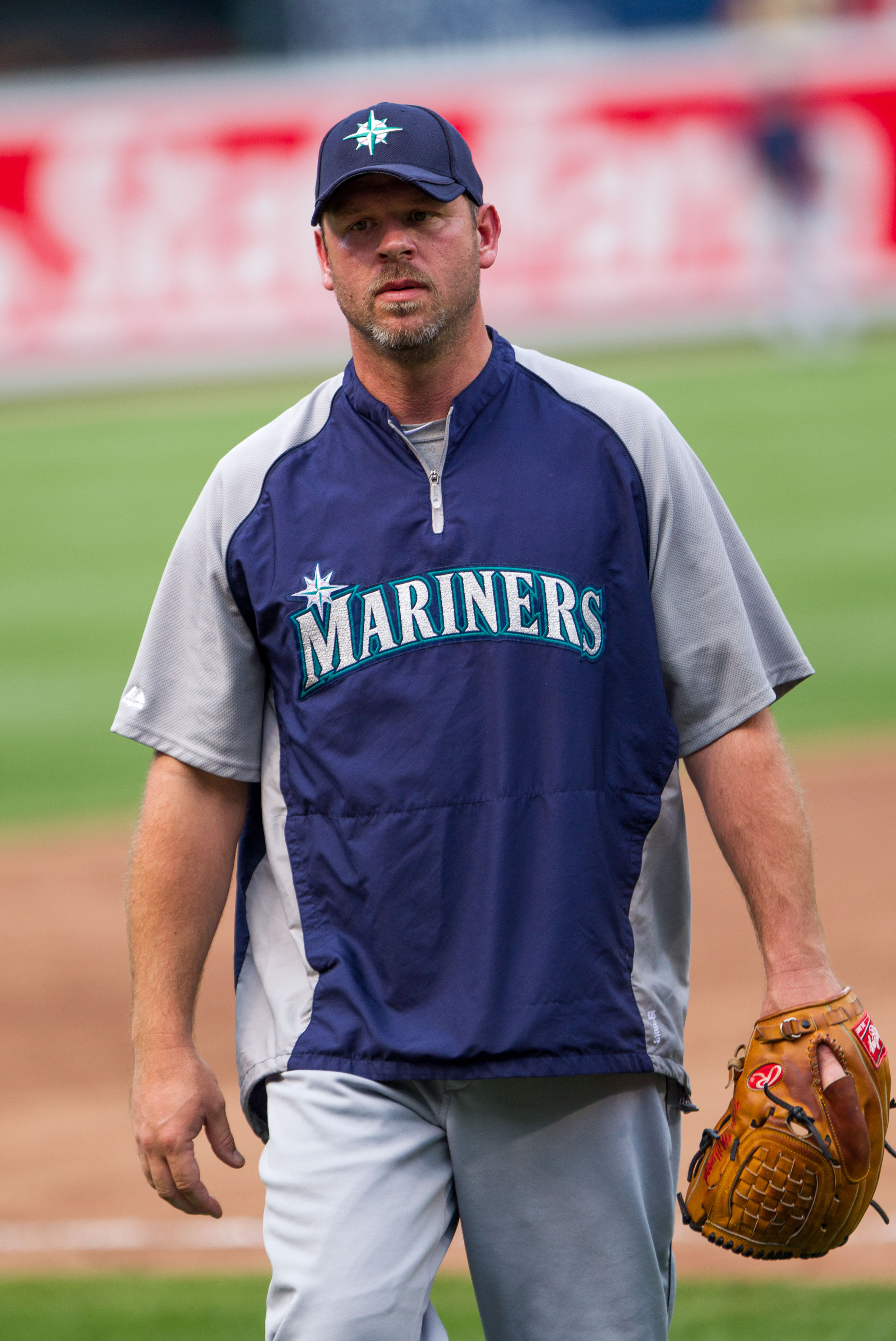 Kevin Millwood